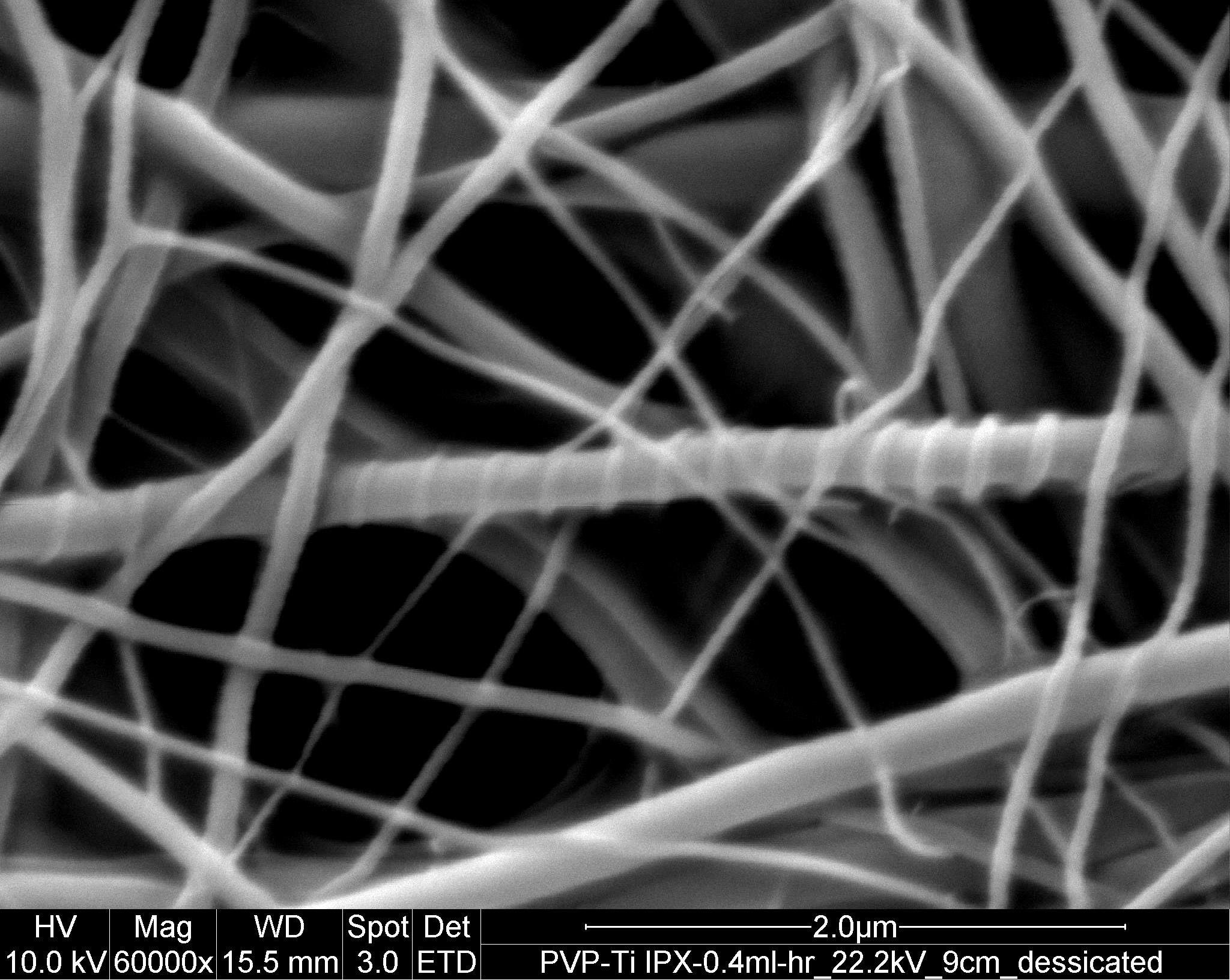 Titanium dioxide nanofibers